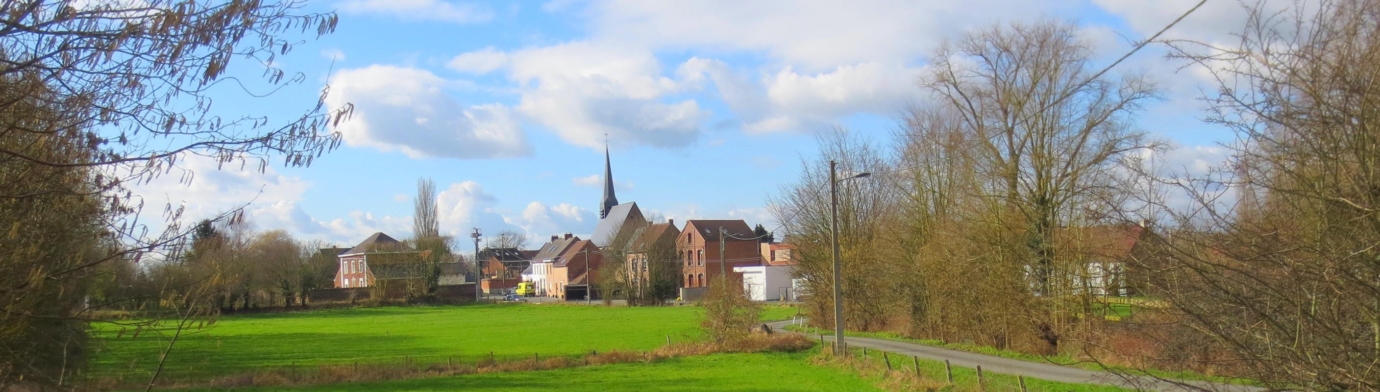 Hellebecq